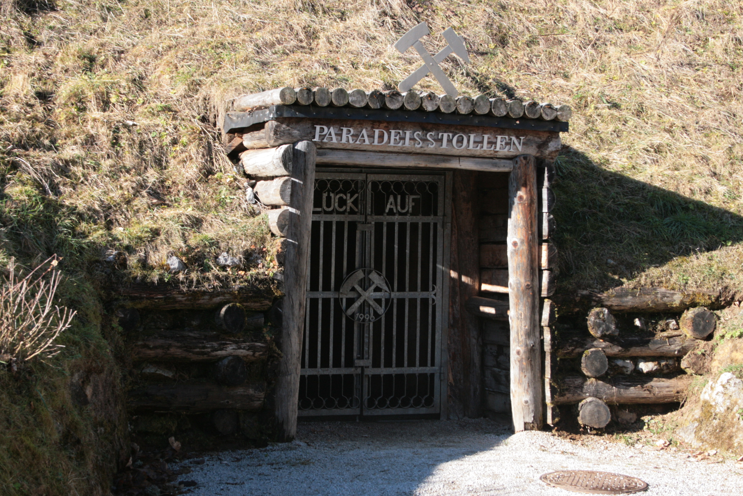 Ehem. Kupferbergbaustollen, sogen. Paradeisstollen